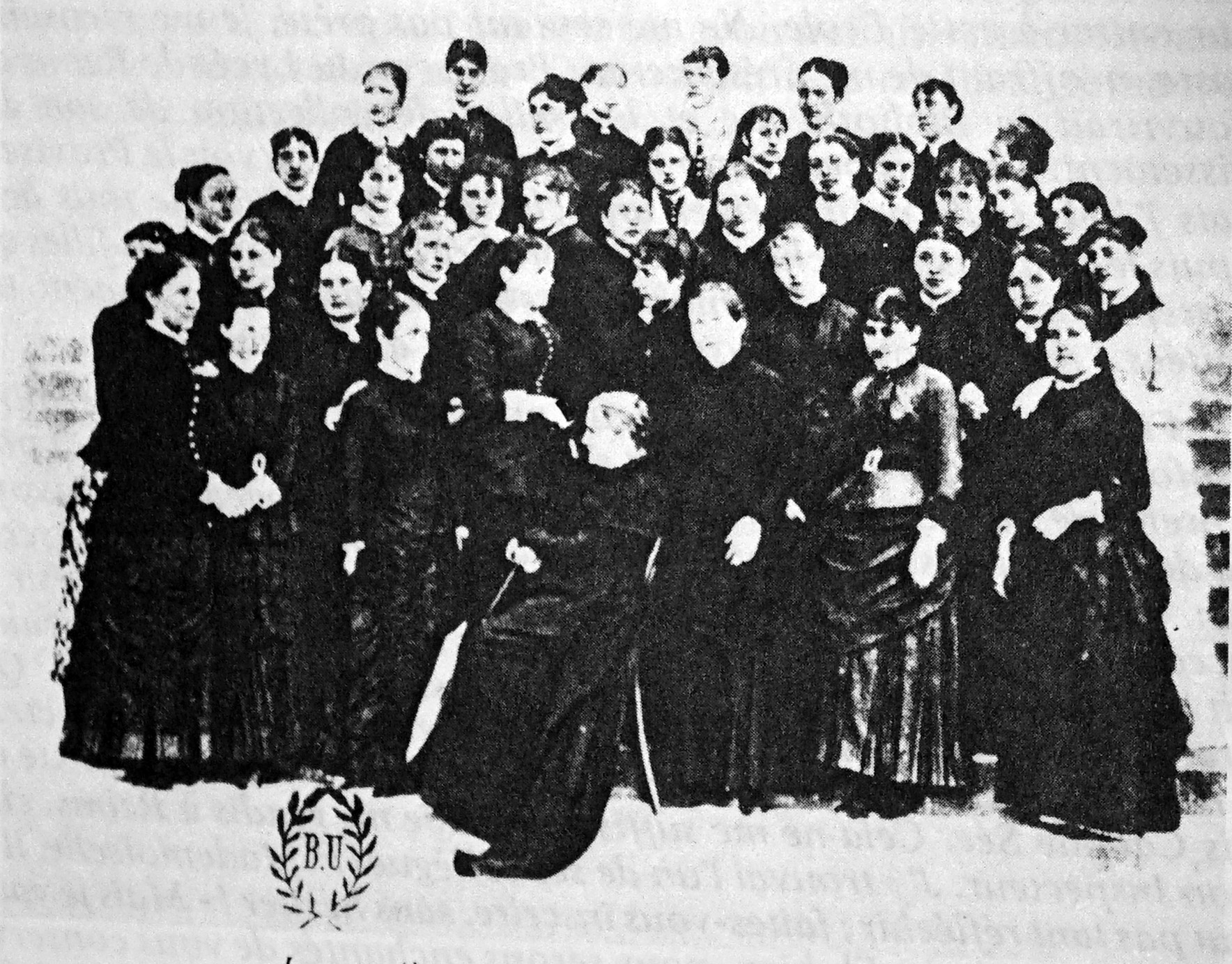 sur une vue ancienne.